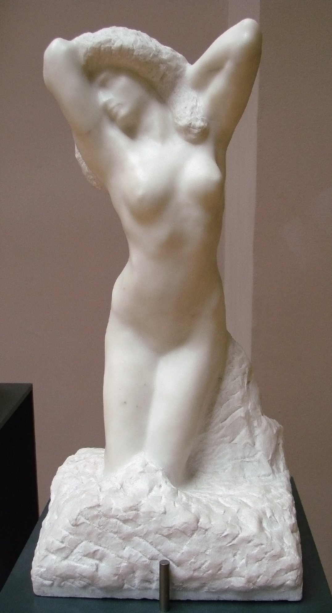 La toilette de Vénus, par Auguste Rodin (1840-1917). Musée des Beaux-Arts de Lille.